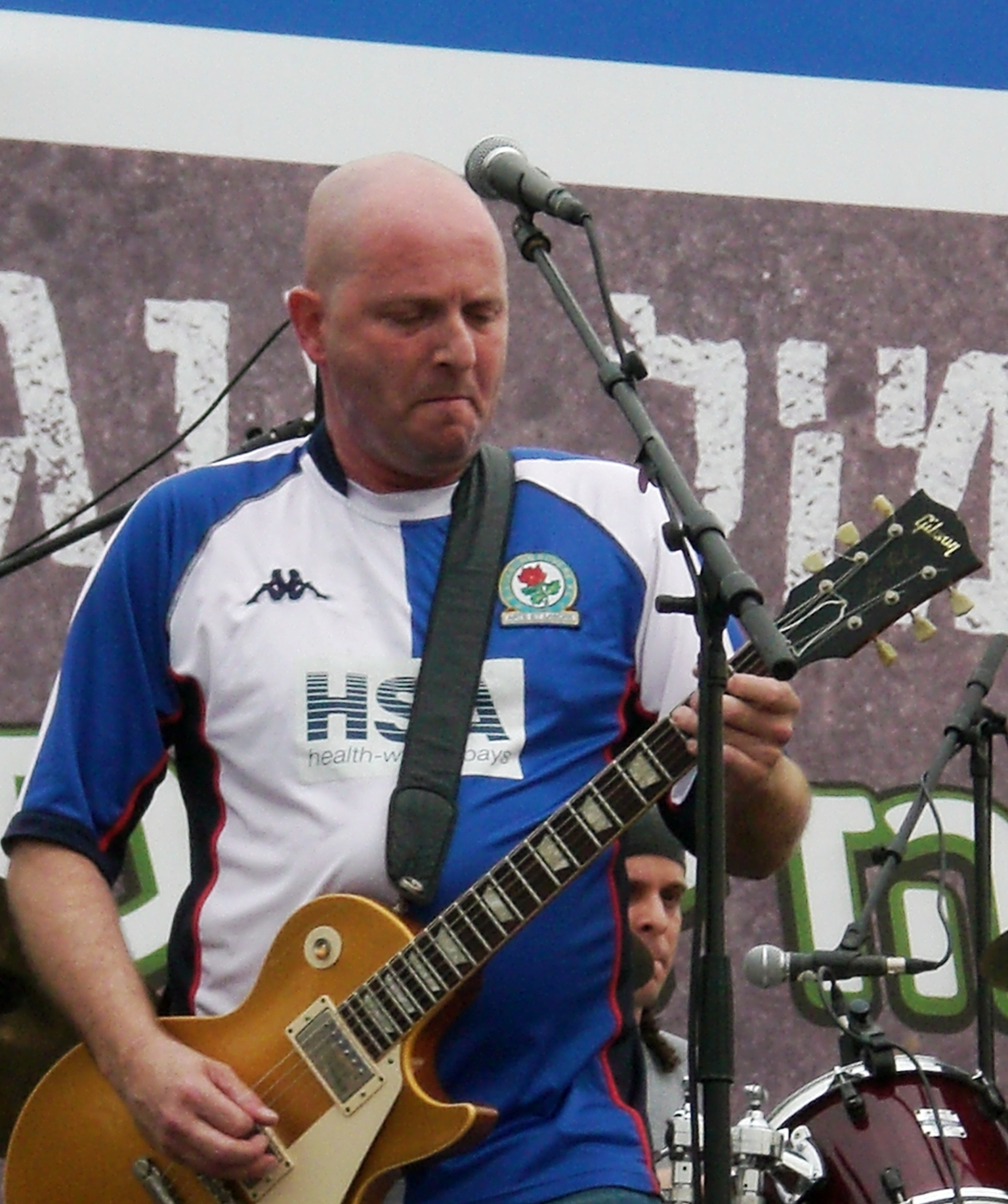 Tal Friedman singing with "The Krayot" band in Tel-Aviv. טל פרידמן בהופעה עם להקת "הקריות" בספורטק ת"א.